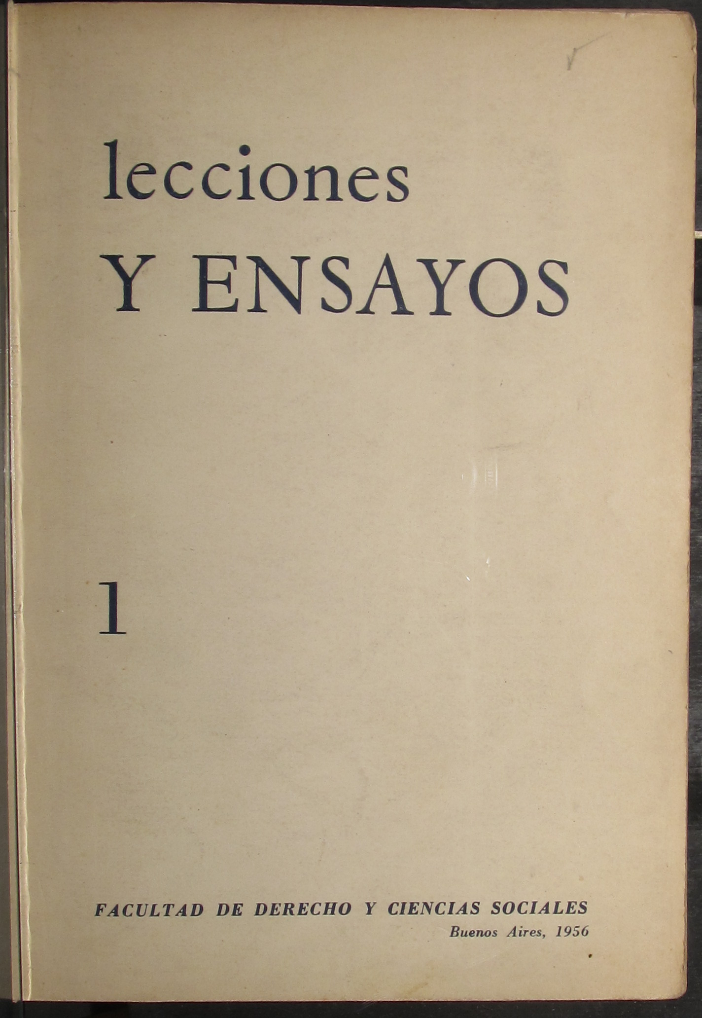 Tapa del número 1 de la Revista Lecciones y Ensayos.